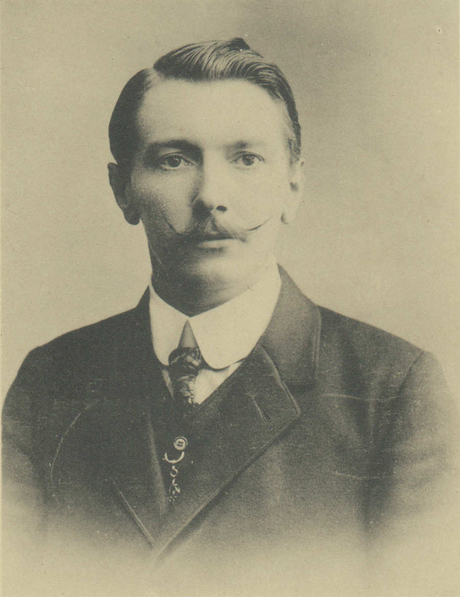 Portrait de Georges Ista.